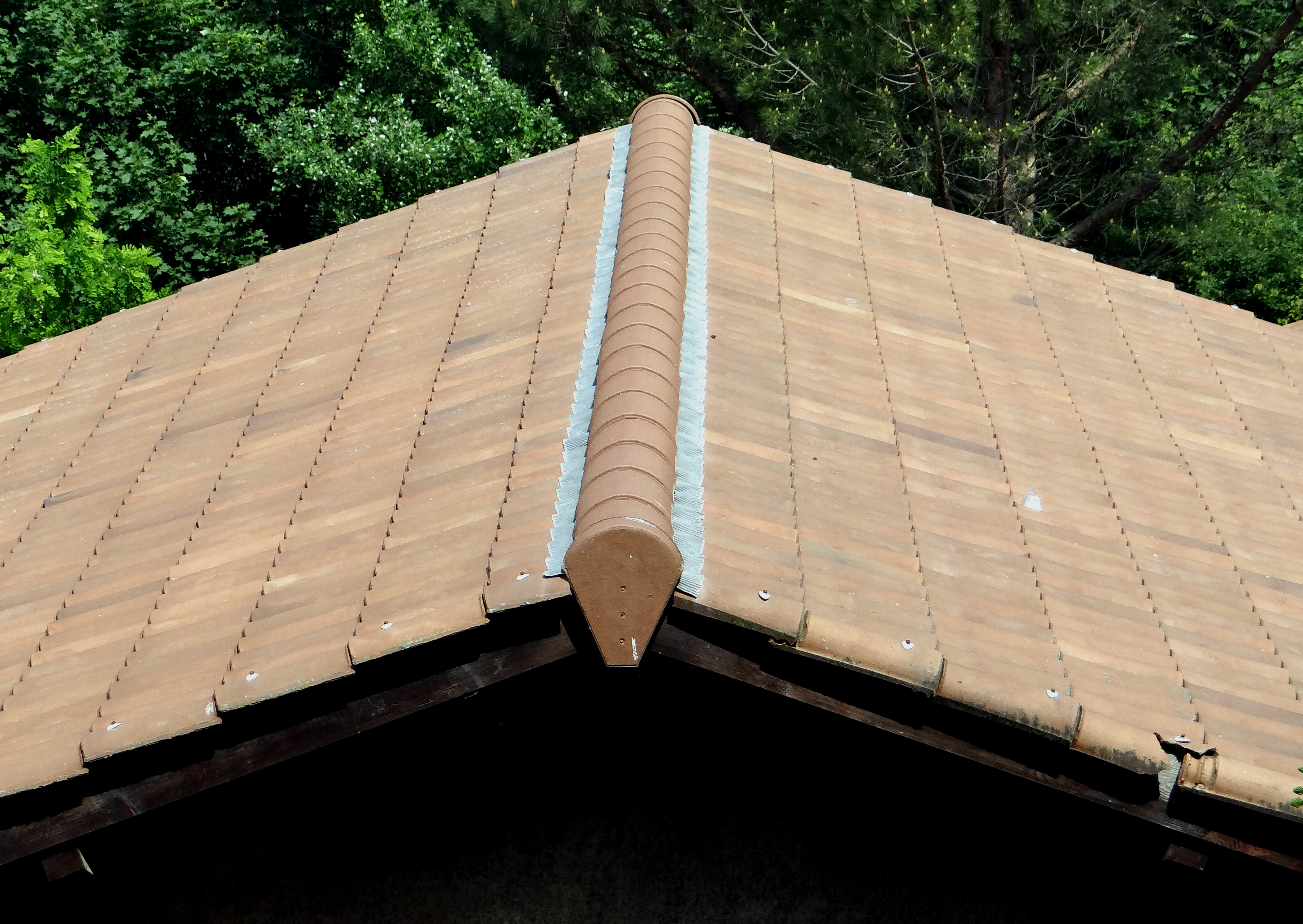 Jars.